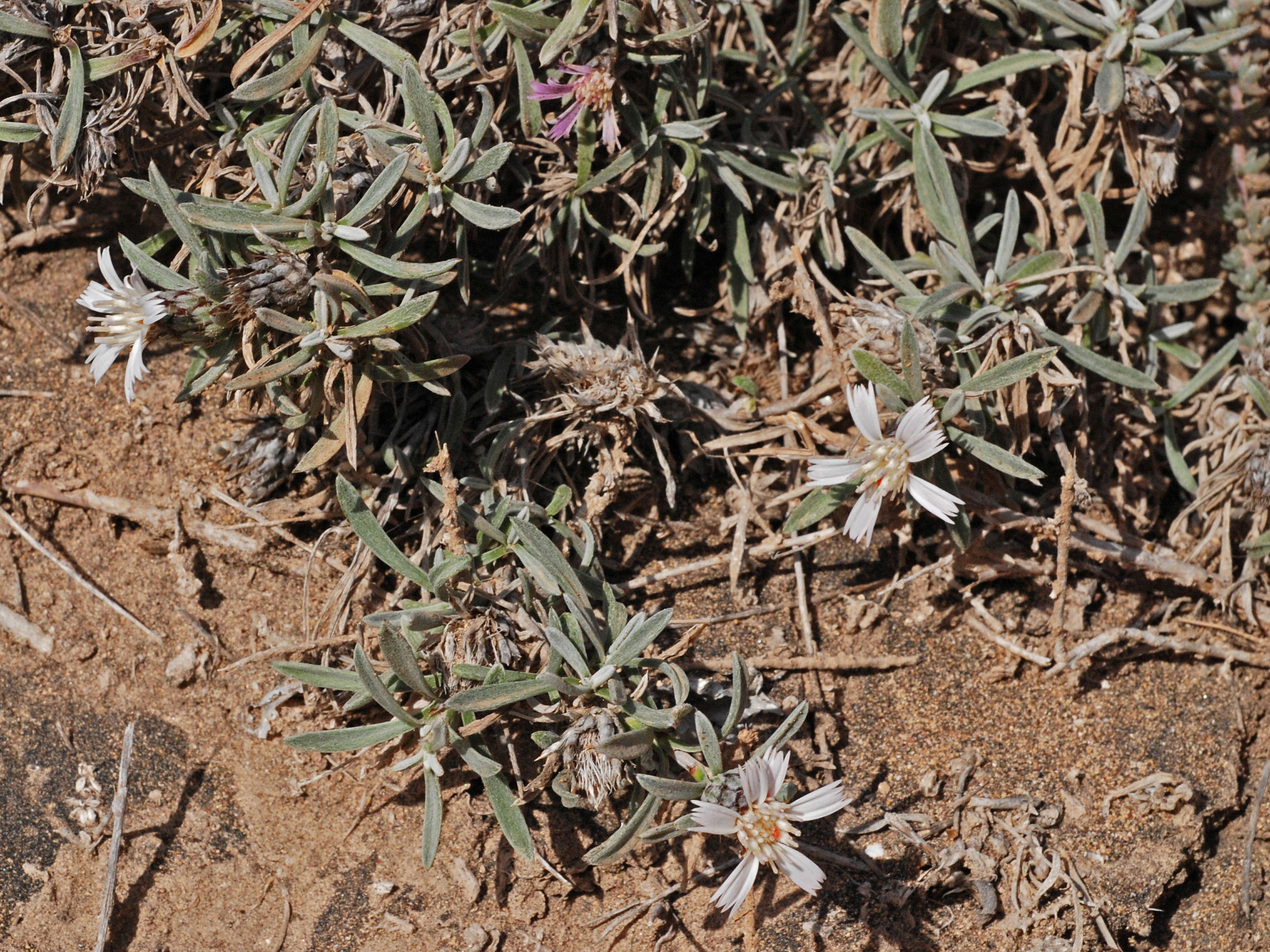 Atractylis preauxiana - Vista parcial- Punta Arinaga, Isla de Gran Canaria (España).